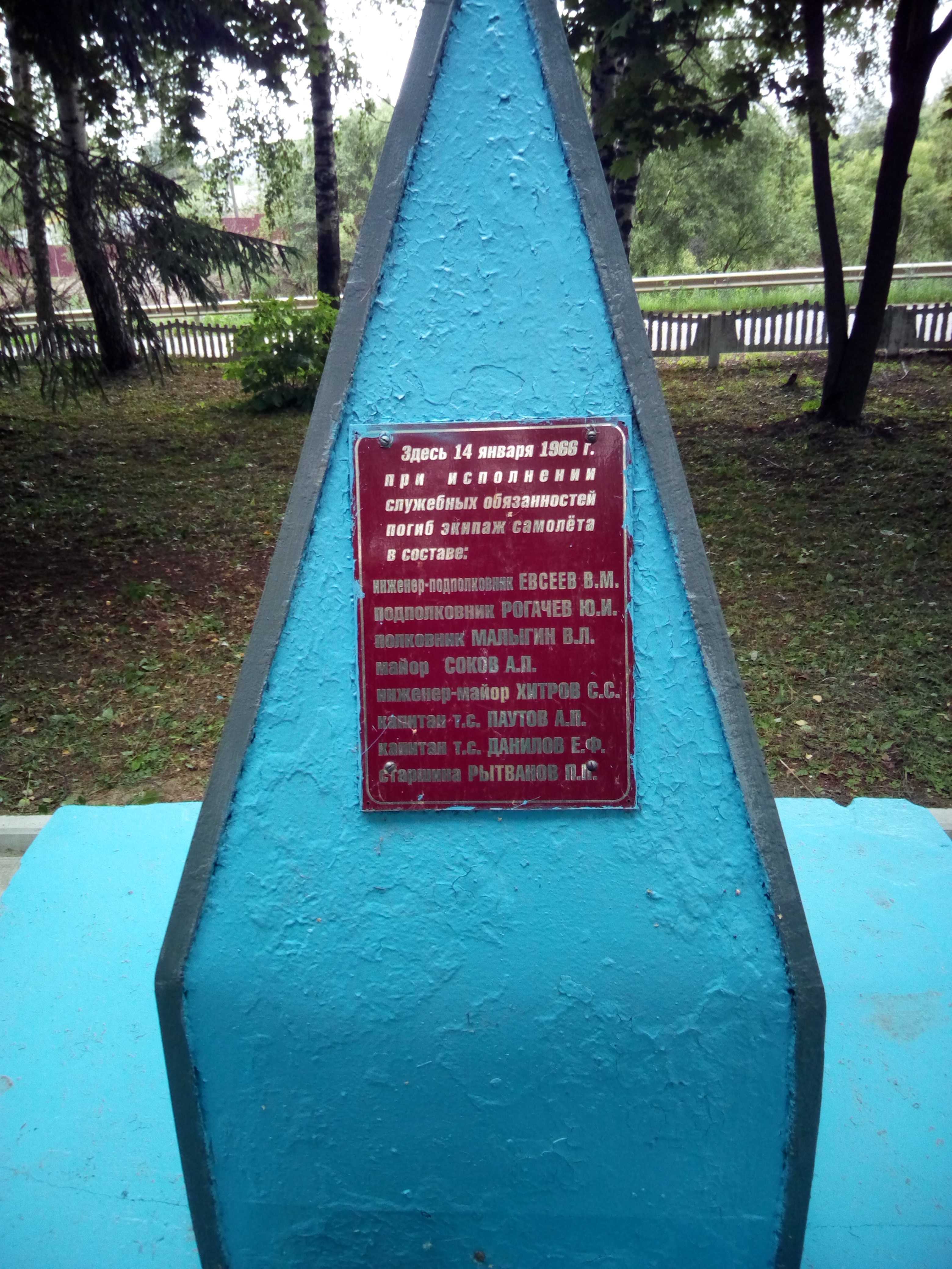 Обелиск погибшим лётчикам.